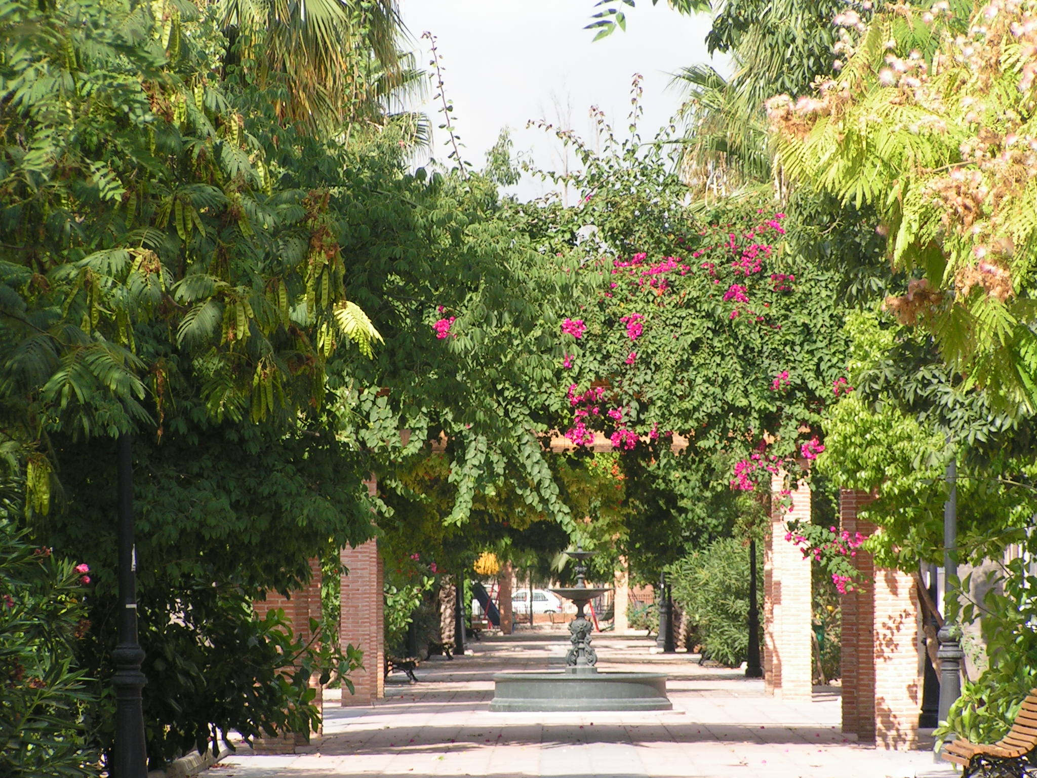 Gran Via País Valencià